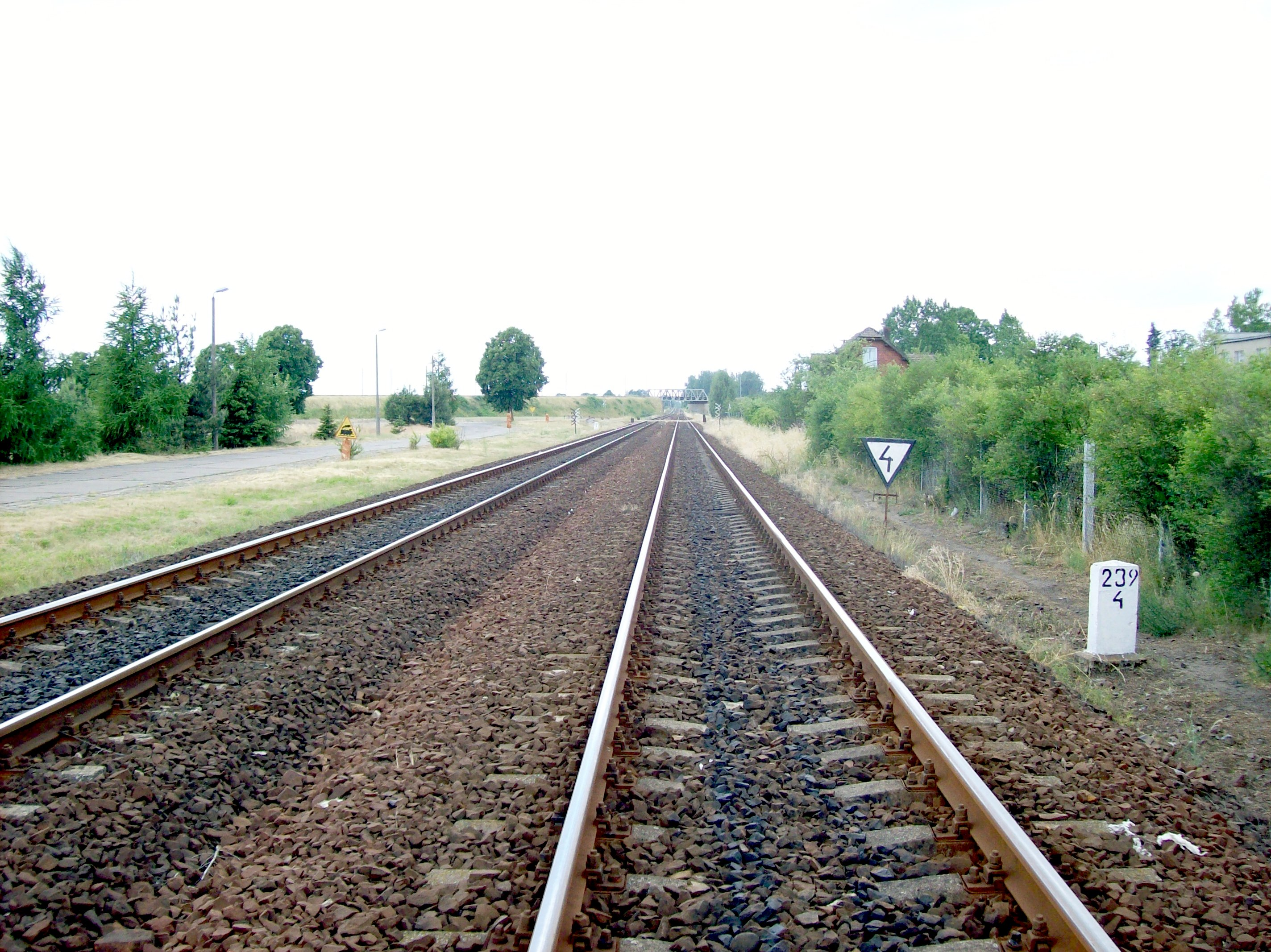 Linia kolejowa 203 (szlak Krzyż - Stare Bielice).